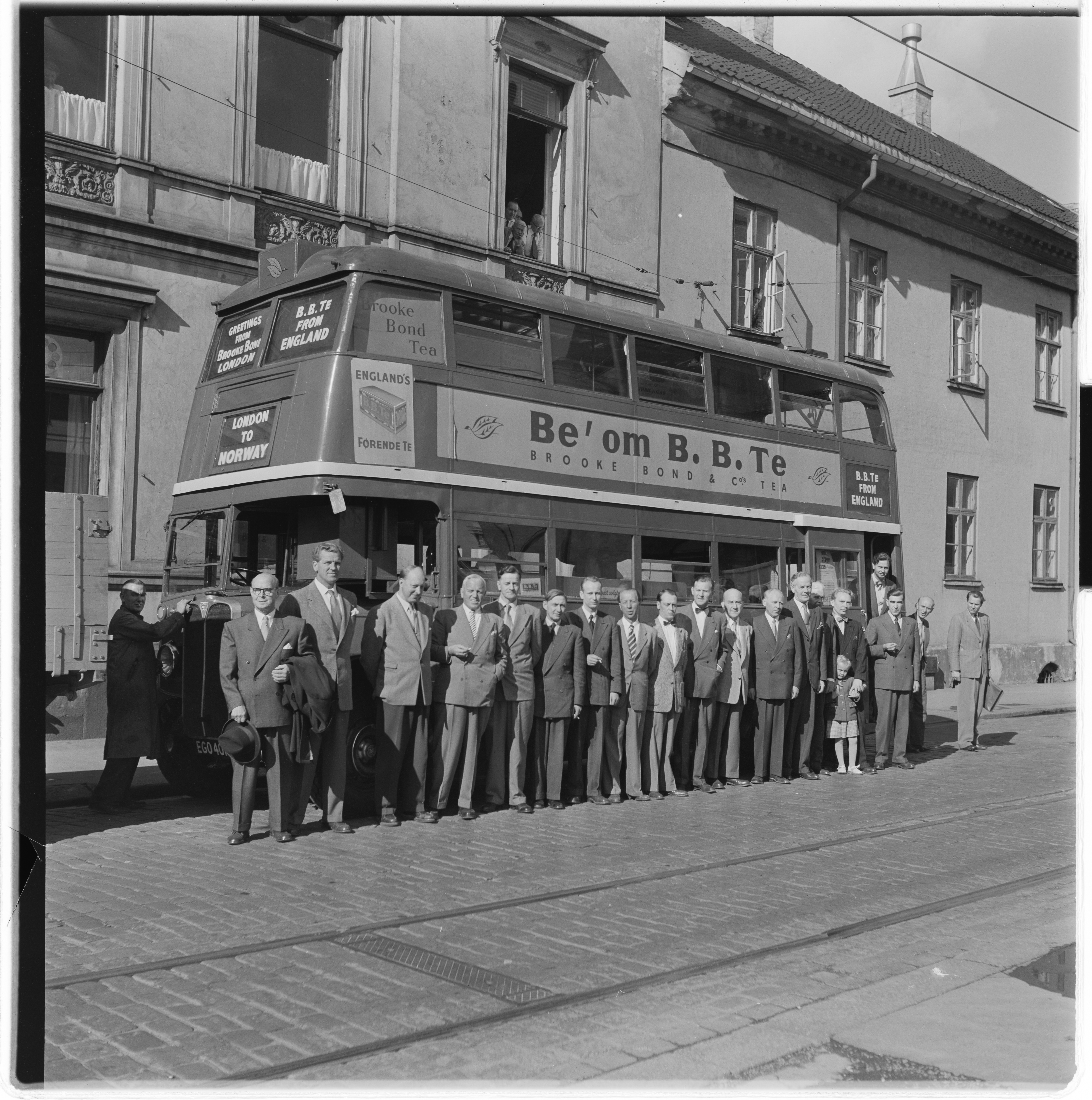 Bildet er hentet fra Arkivverket. Brook Bond's Tea Arkivinstitusjon : Riksarkivet Arkivnavn : Billedbladet NÅ Sted : Norge, Oslo, Oslo, Emneord: dobbeltdekker, te, reklame Avbildet